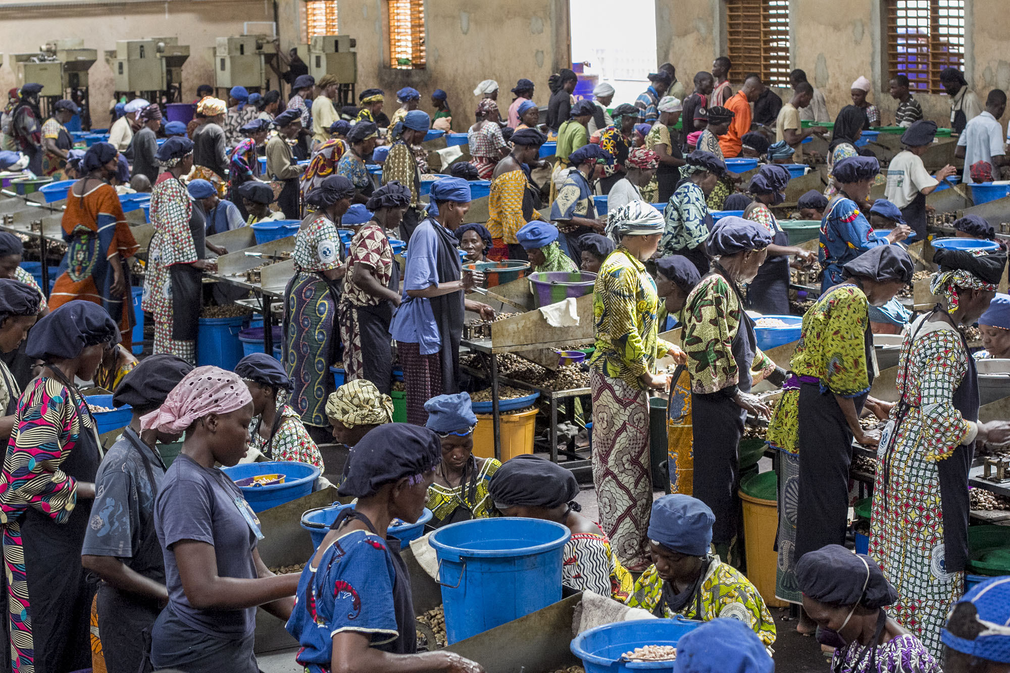 Des milliers d'employés s'activent chaque jour pour décortiquer à la main les noix avant qu'elles ne soient lavés et conditionnées pour la vente. La majorité d'entre eux sont des femmes. This is an image of "African people at work" from Burkina Faso